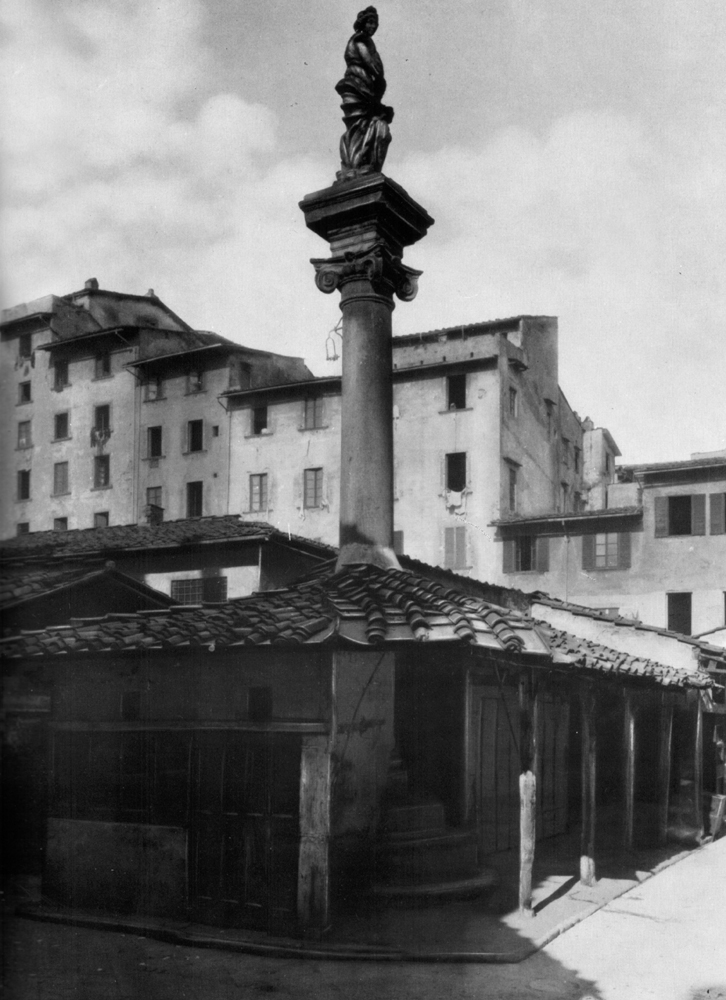 Colonna dell'abbondanza before 1881